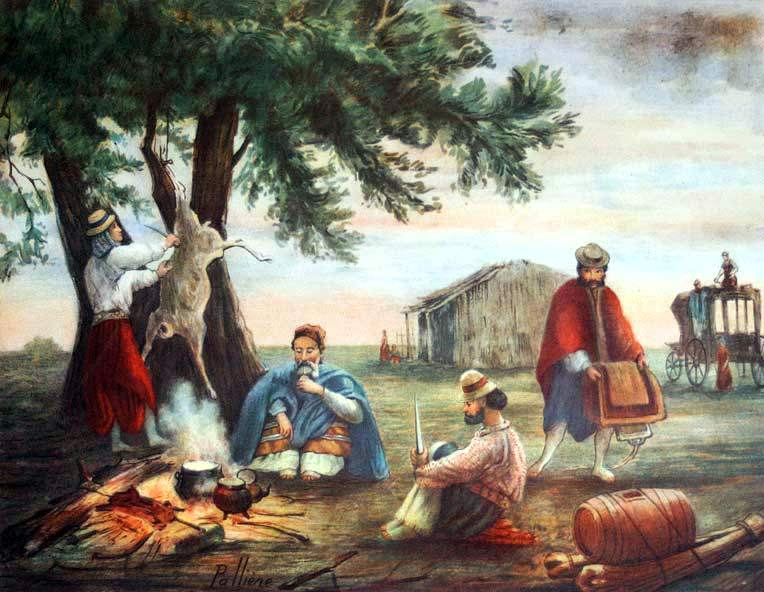 La Posta de San Luis. Acuarela